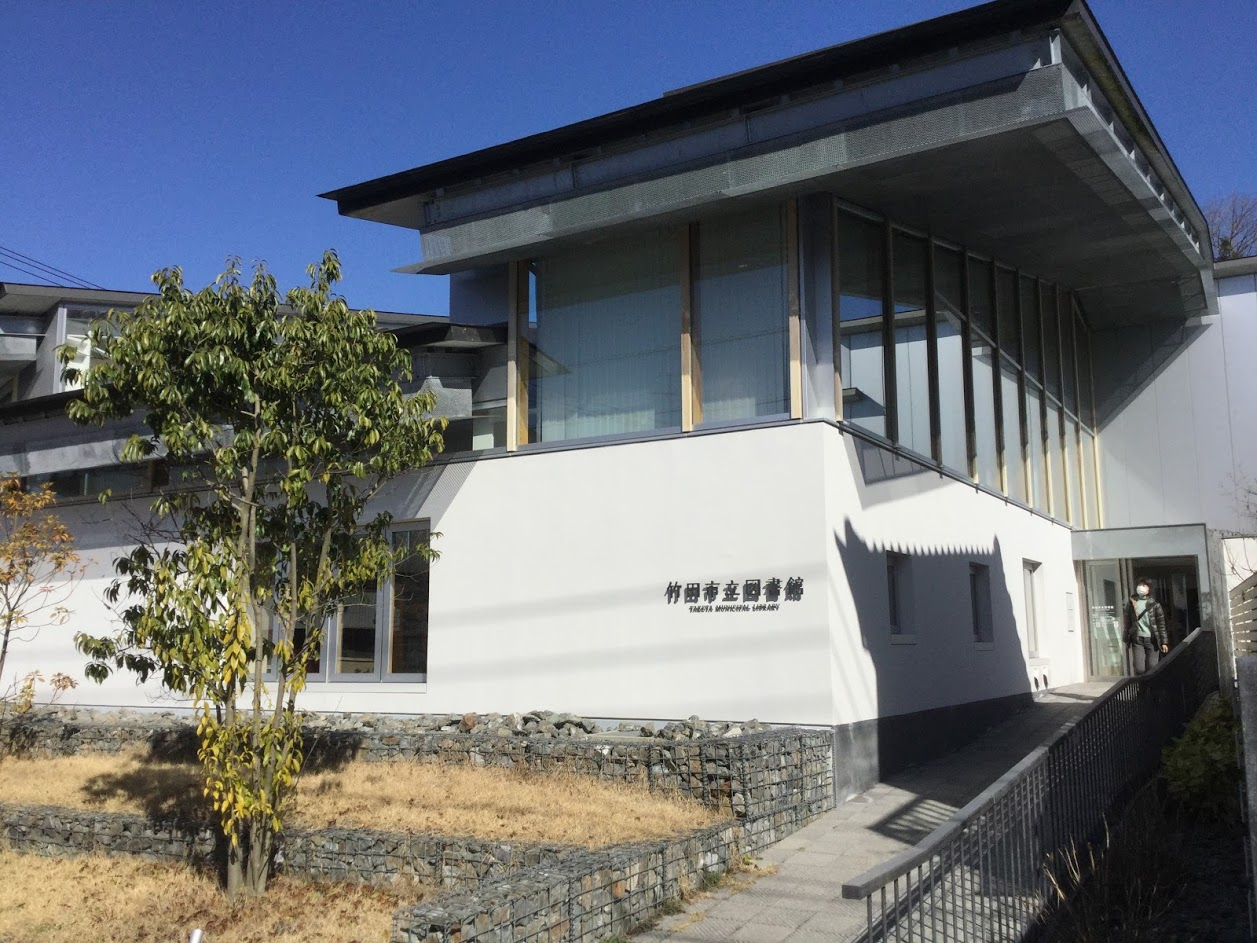 竹田市立図書館 西エントランス